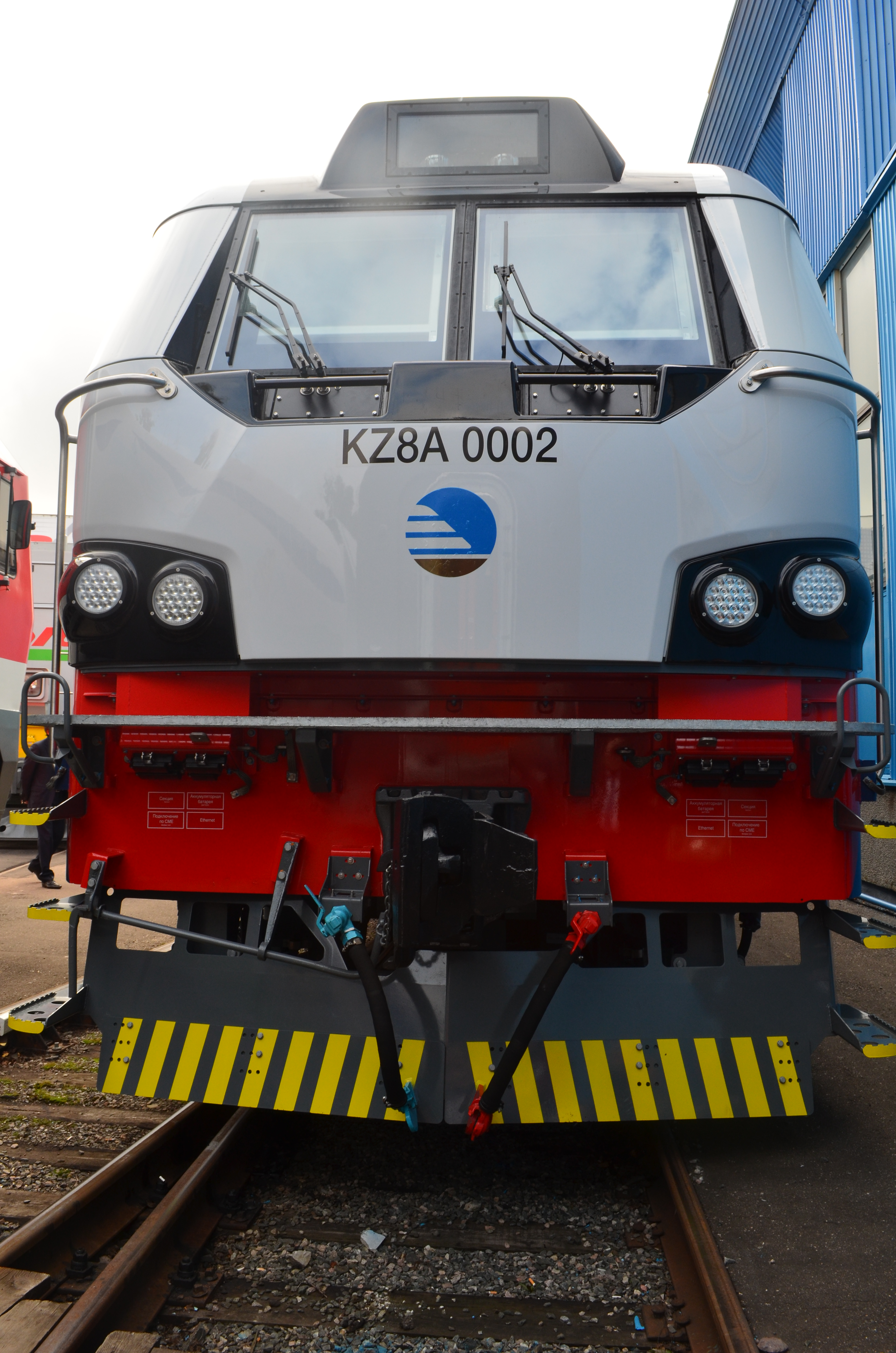 locomotive KZ8A-0002